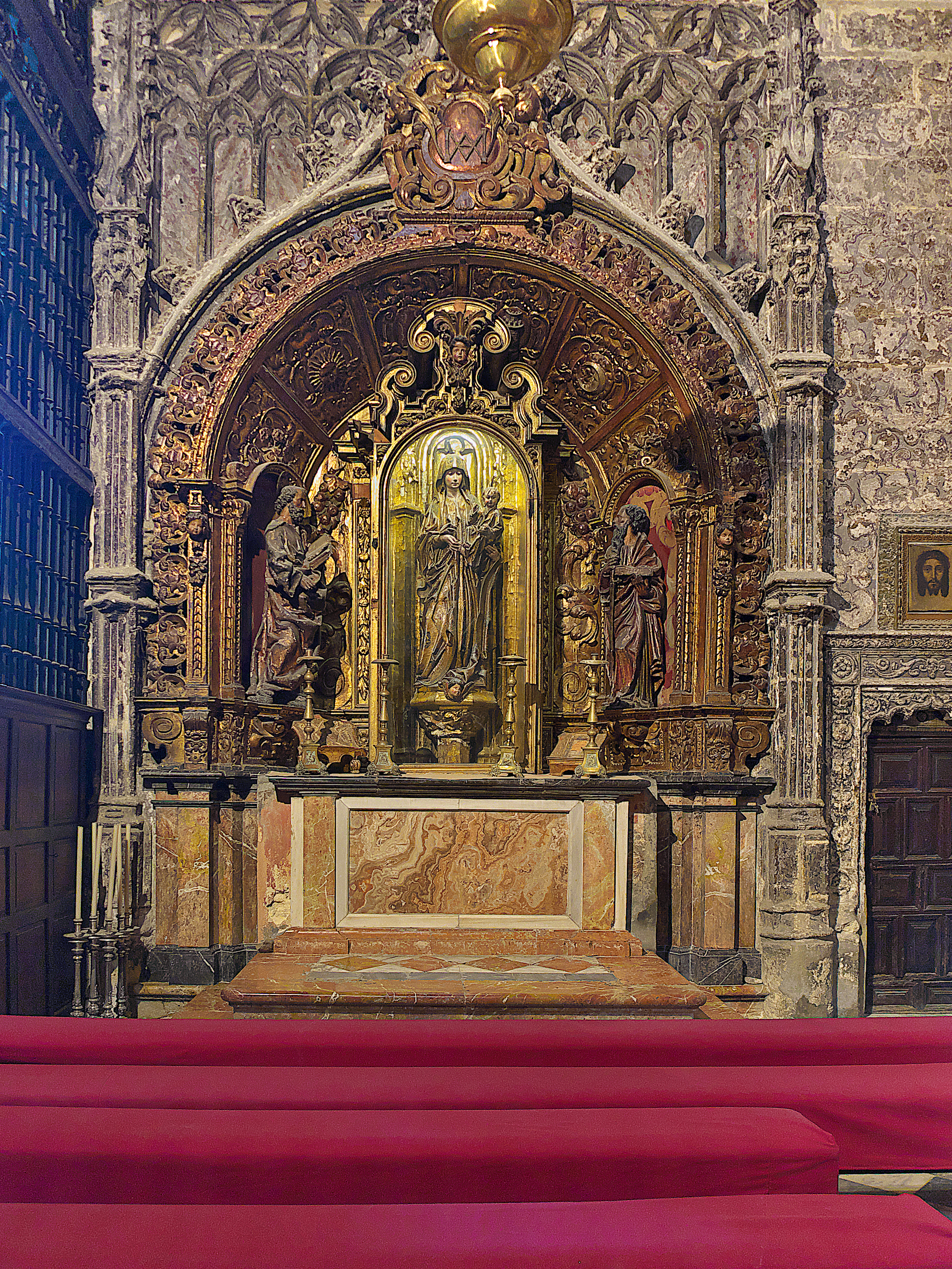 La arquitectura (1488-1496) es de Juan de Hoces (o Juan de Foz), maestro mayor de la Catedral.